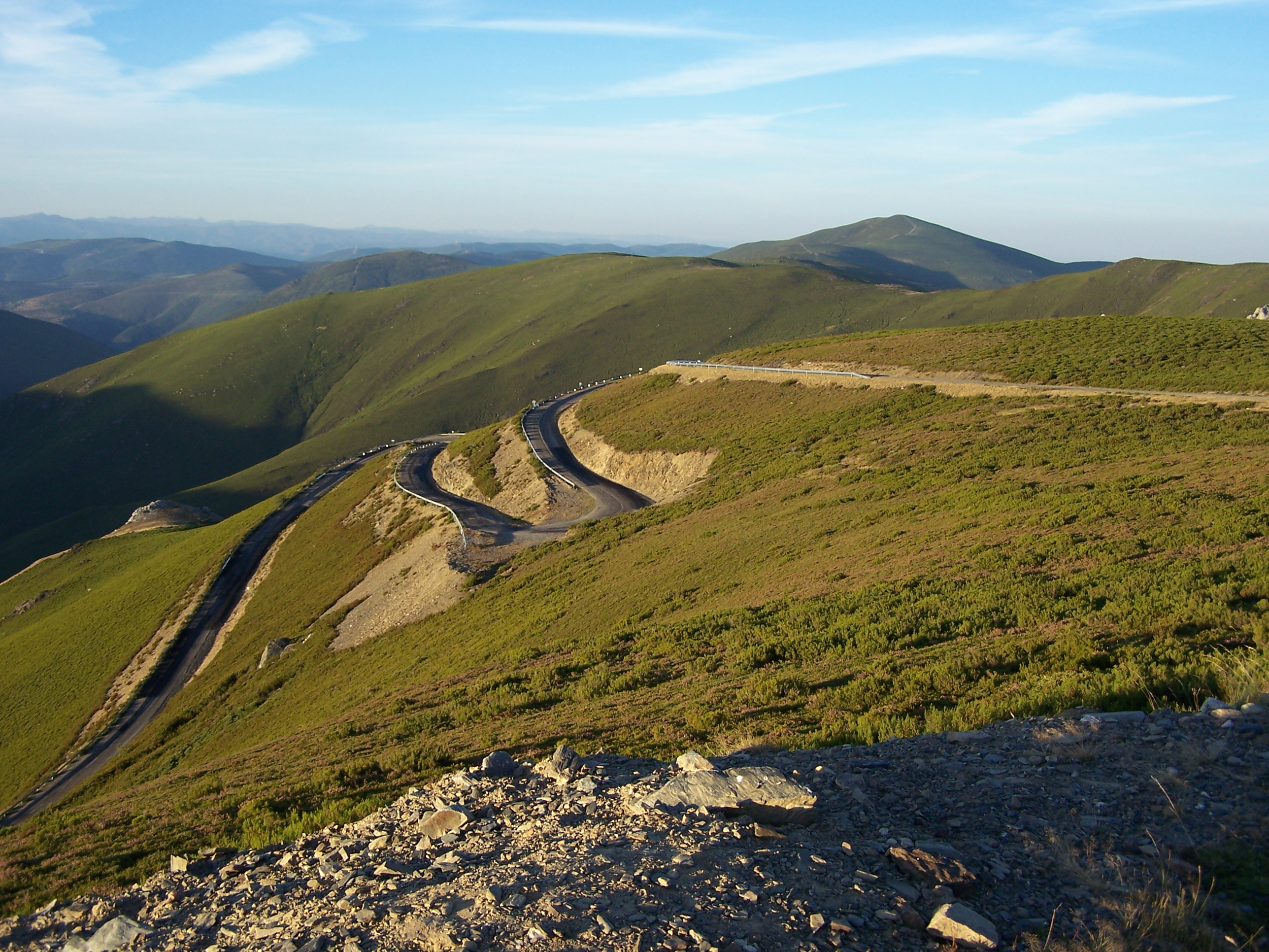 El Morredero